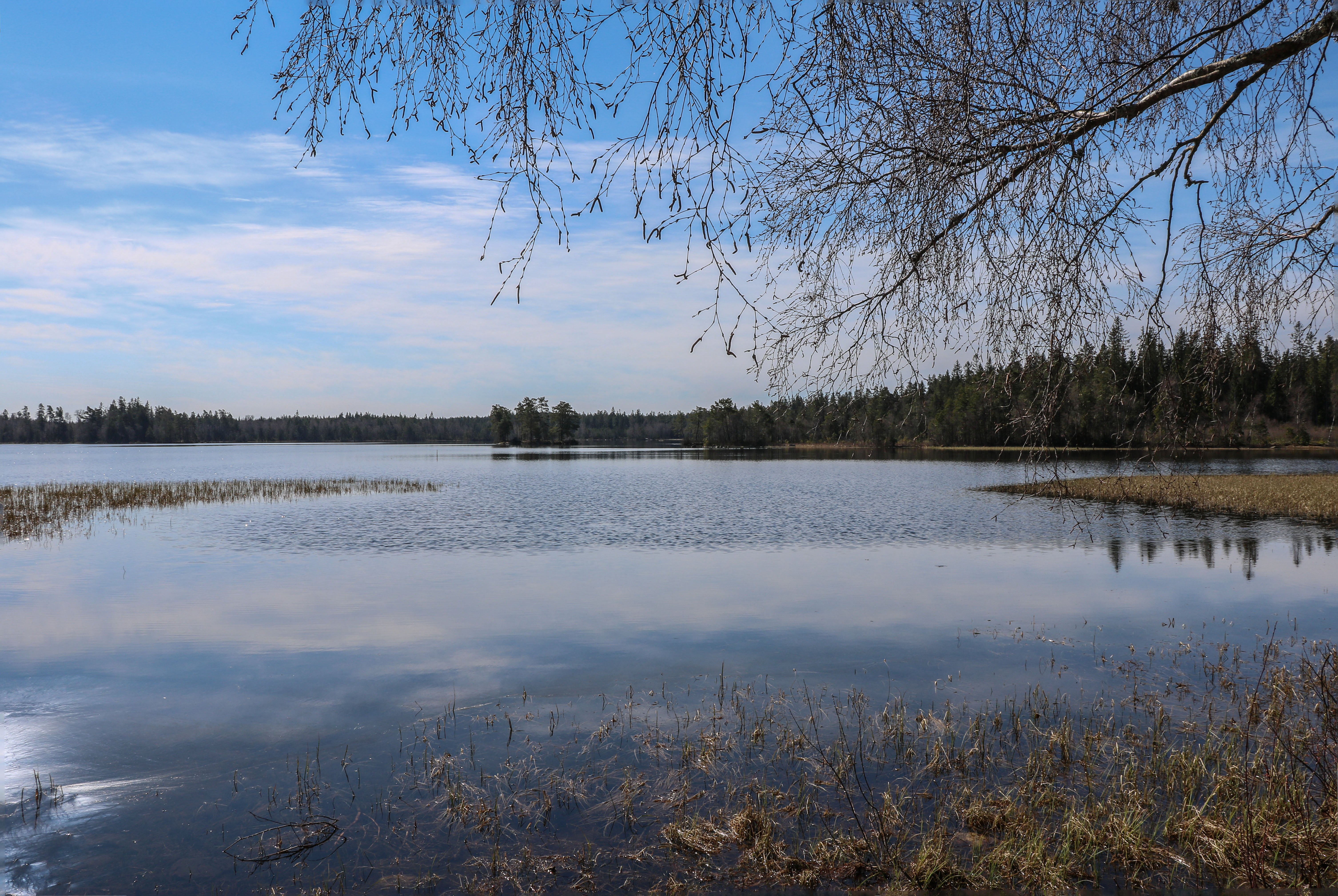 Sjöatorpasjön i Nottebäck, Uppvidinge kommun.